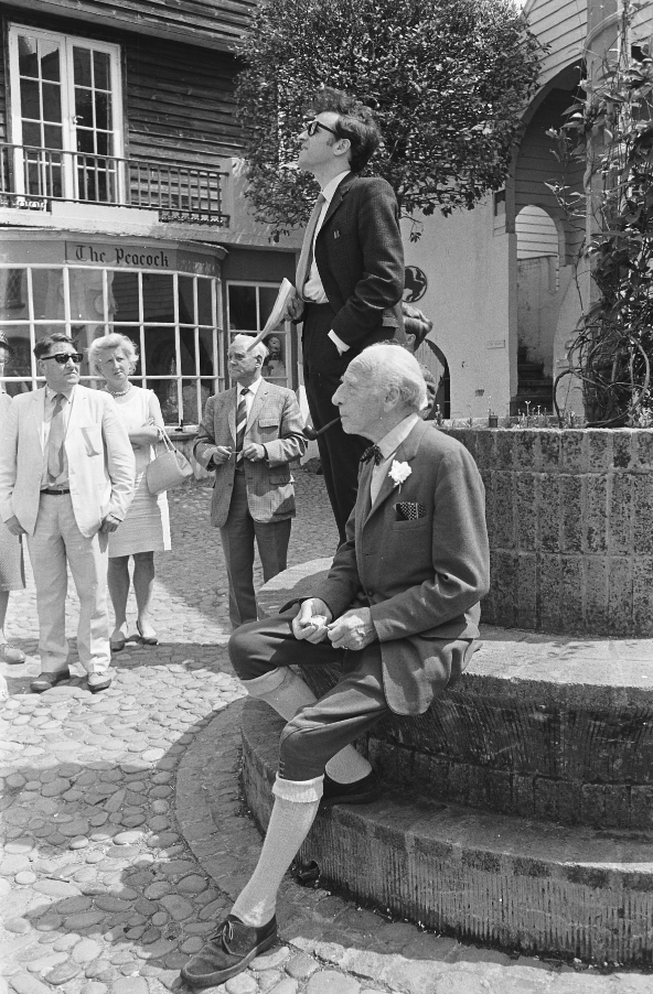 Teitl Cymraeg/Welsh title: Golygfeydd o Bortmeirion Ffotograffydd/Photographer: Geoff Charles (1909-2002) Dyddiad/Date: Mehefin/ June 1, 1969 Cyfrwng/Medium: Negydd ffilm / Film negative Cyfeiriad/Reference: (gcc62786) Rhif cofnod / Record no.: 006199439 Rhagor o wybodaeth am gasgliad Geoff Charles yn Llyfrgell Genedlaethol Cymru More information about the Geoff Charles Collection at the National Library of Wales Mae ffotograffau Geoff Charles hefyd yn rhan o Broject Europeana Libraries Geoff Charles' photographs also form part of the Europeana Libraries Project